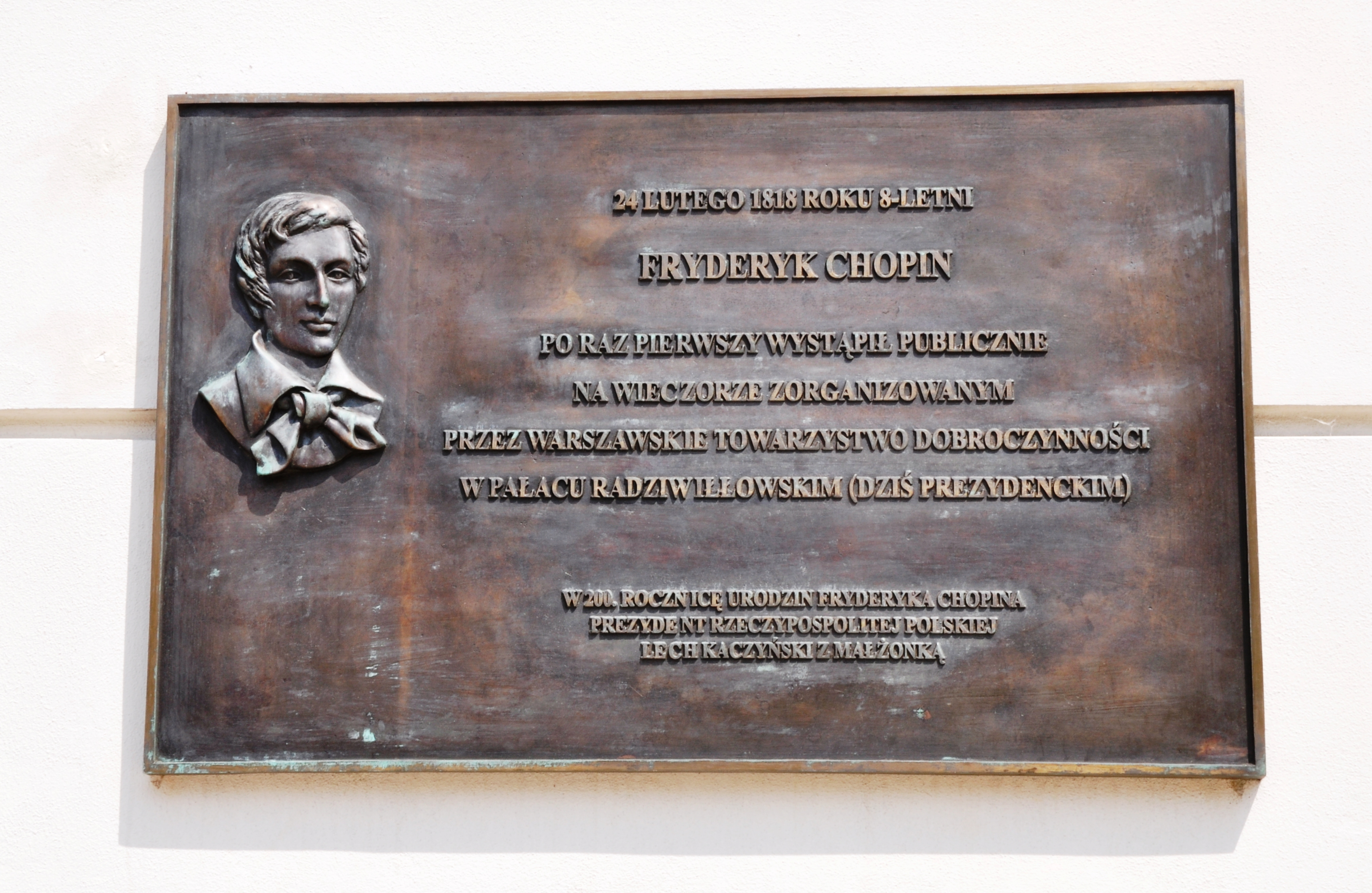 Warschau, Gedenktafel, Frederic Chopin